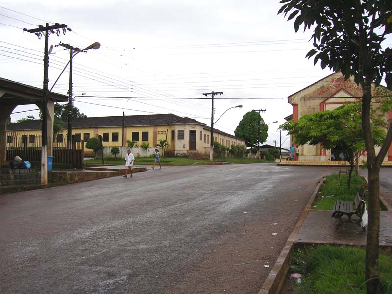 Ville d'Oiapoque (Brésil) Vue du quartier du tribunal. 2005.